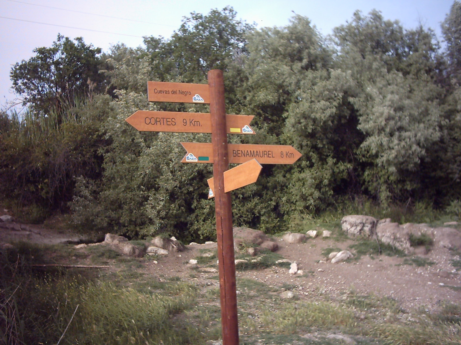 Señalización rural en la pedanía de Cuevas del Negro, perteneciente al municipio de Benamaurel (España).